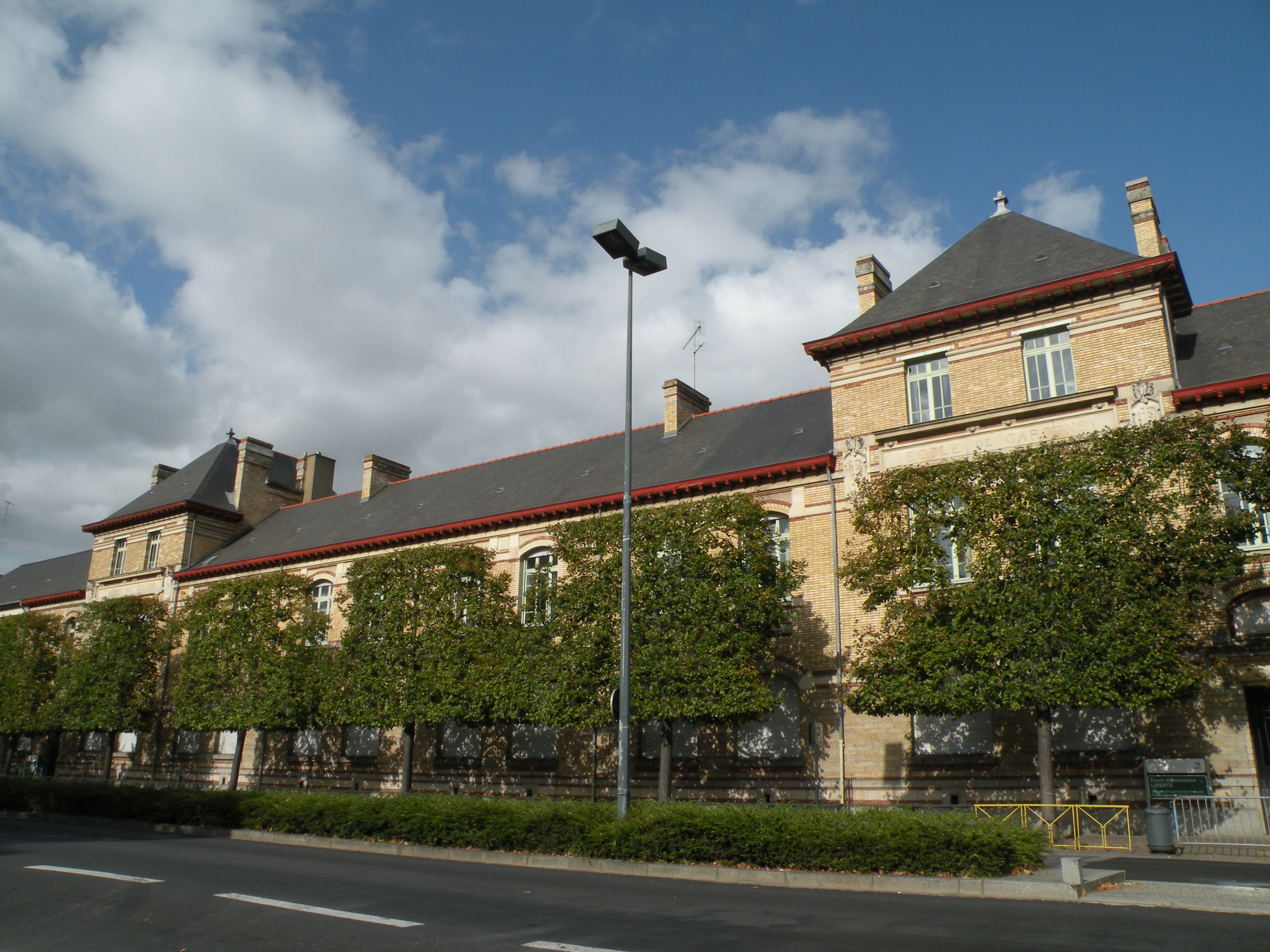 École élémentaire Liberté à Rennes, construite par Emmanuel Le Ray.